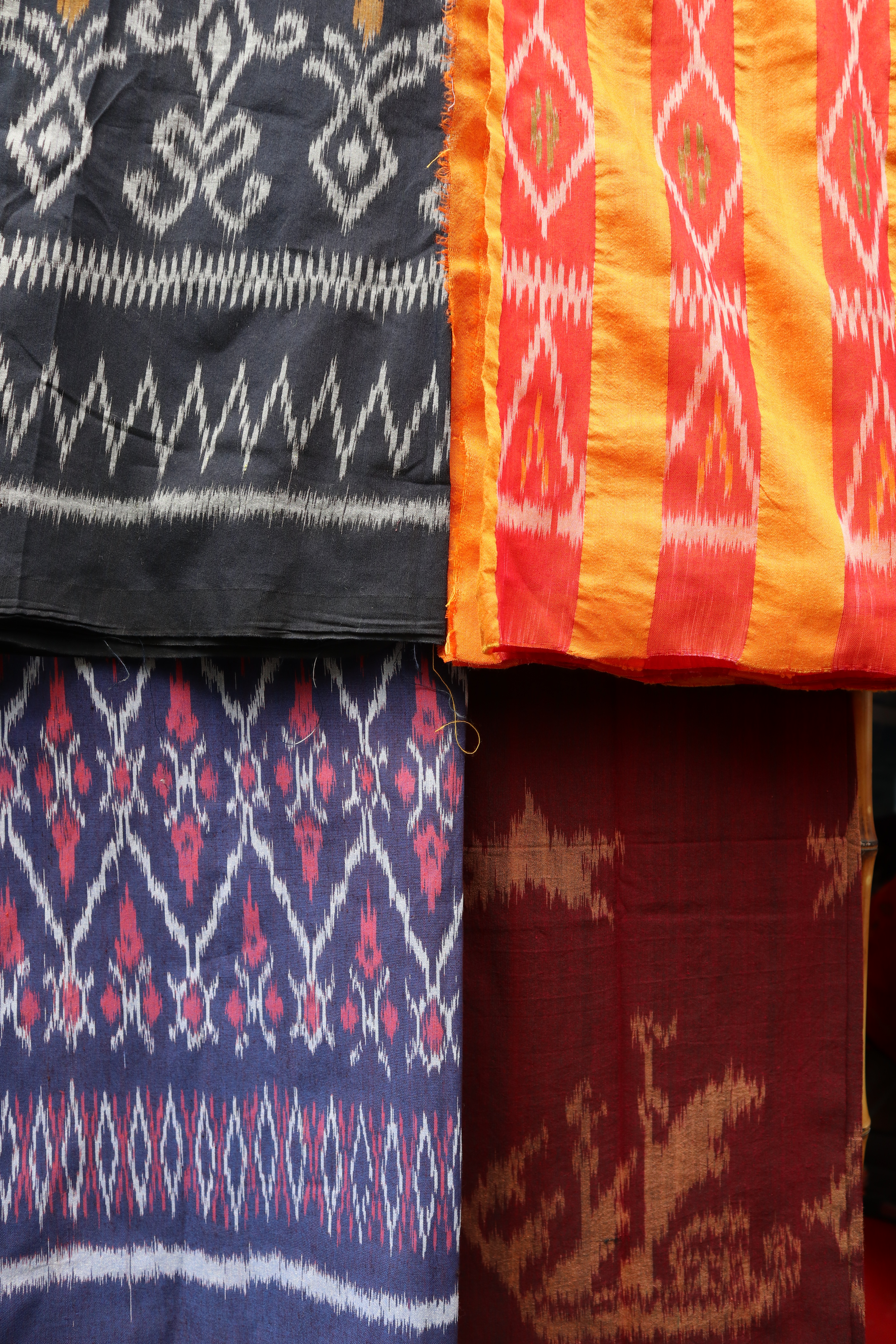 Motif dari kain tenun Pagatan.